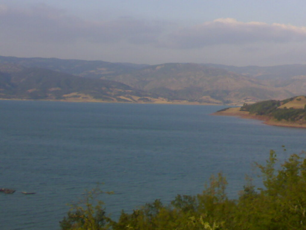 ALMUS BARAJI TOKAT